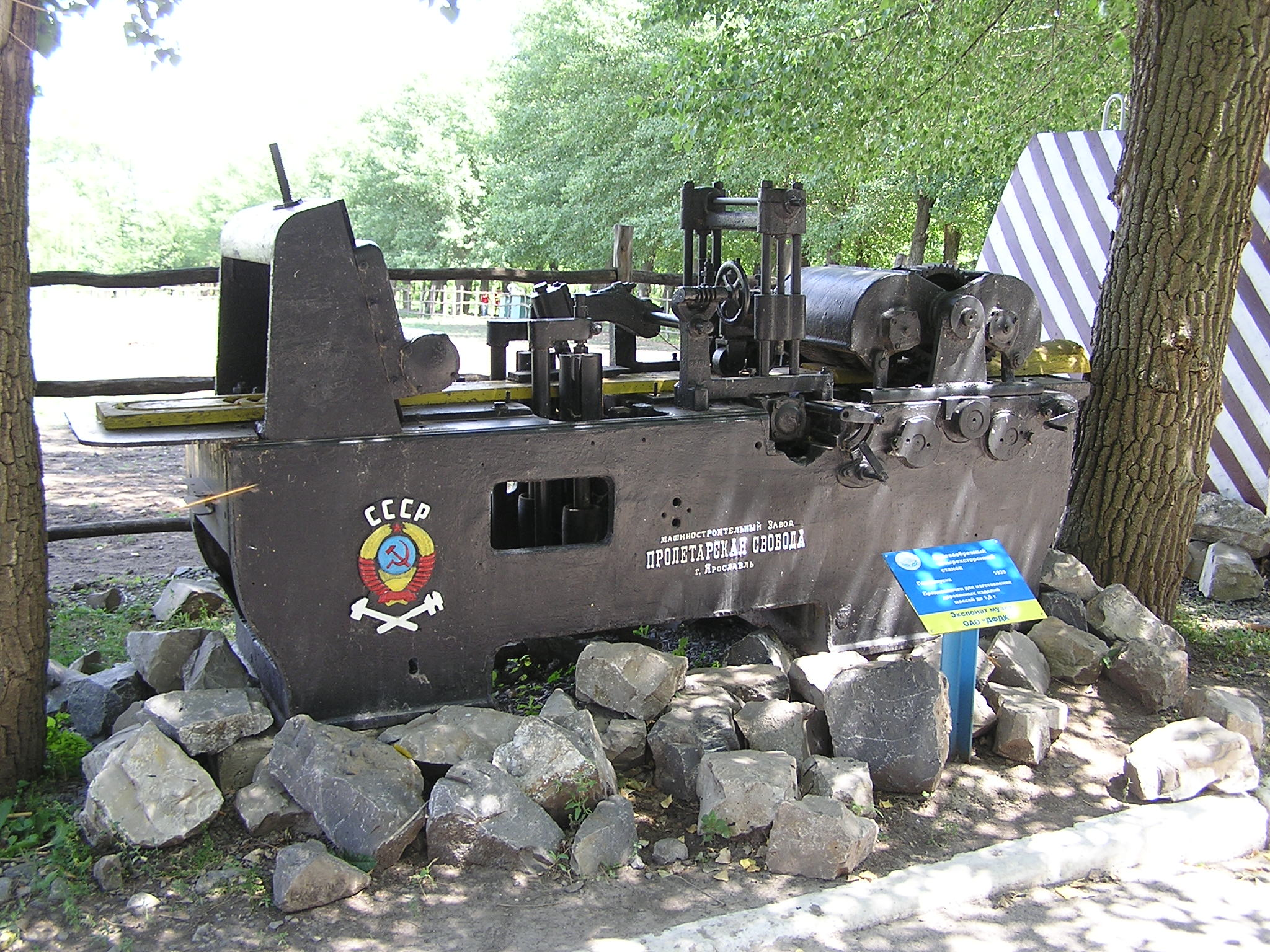 Музей ОАО "Докучаевский флюсо-доломитный комбинат". Деревообрезный четырёхсторонний станок 1939 года выпуска